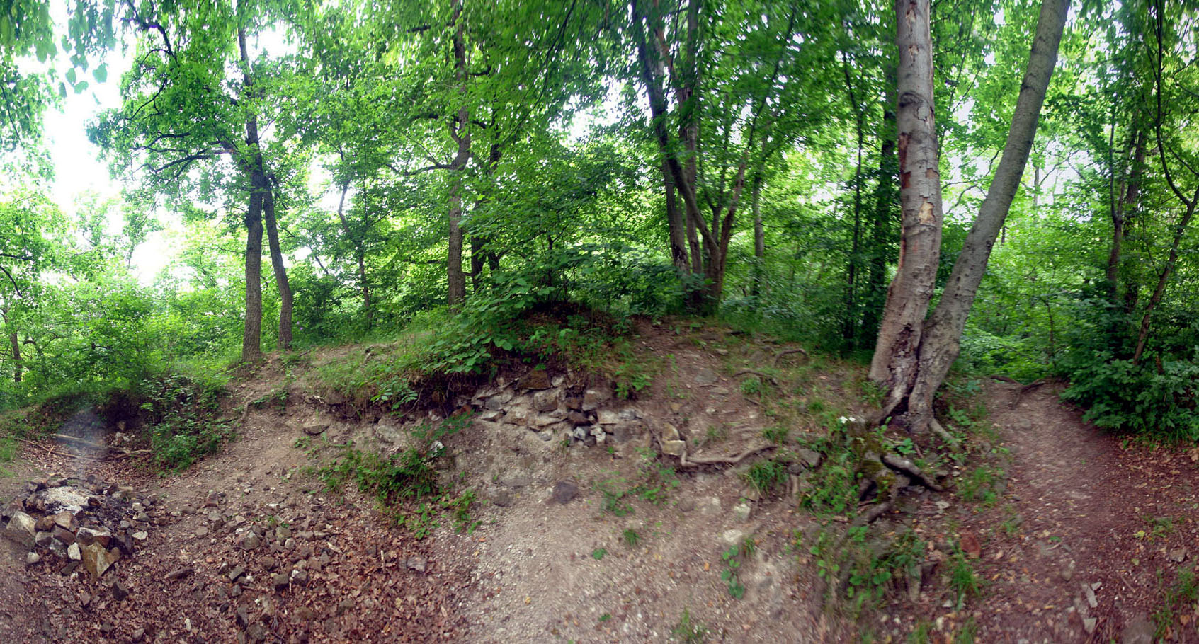 Zbytky valů a zdiva zaniklého hradu Karlík.